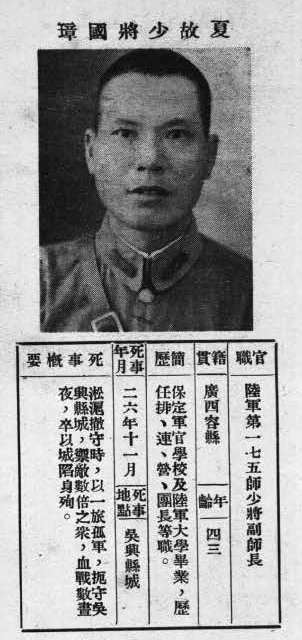 中文（台灣）: 抗戰軍人忠烈錄第一輯中的烈士遺像